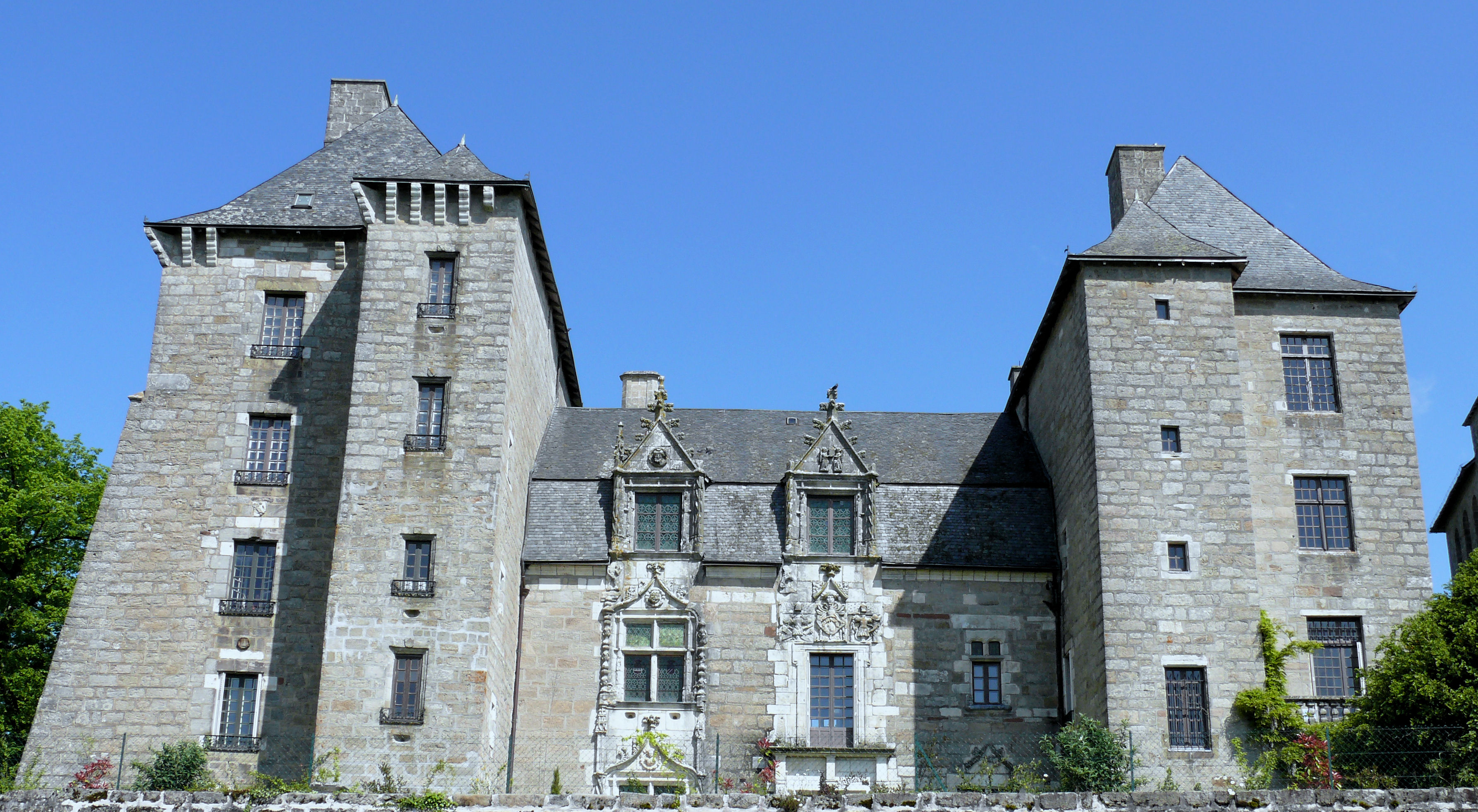 Noailles - Château